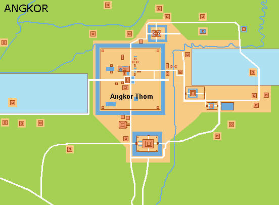 Esquema de la situació d'Angkor Thom. Angkor, Cambodja